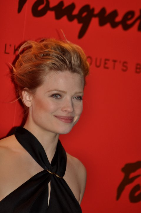 Mélanie Thierry à la cérémonie des César du cinéma